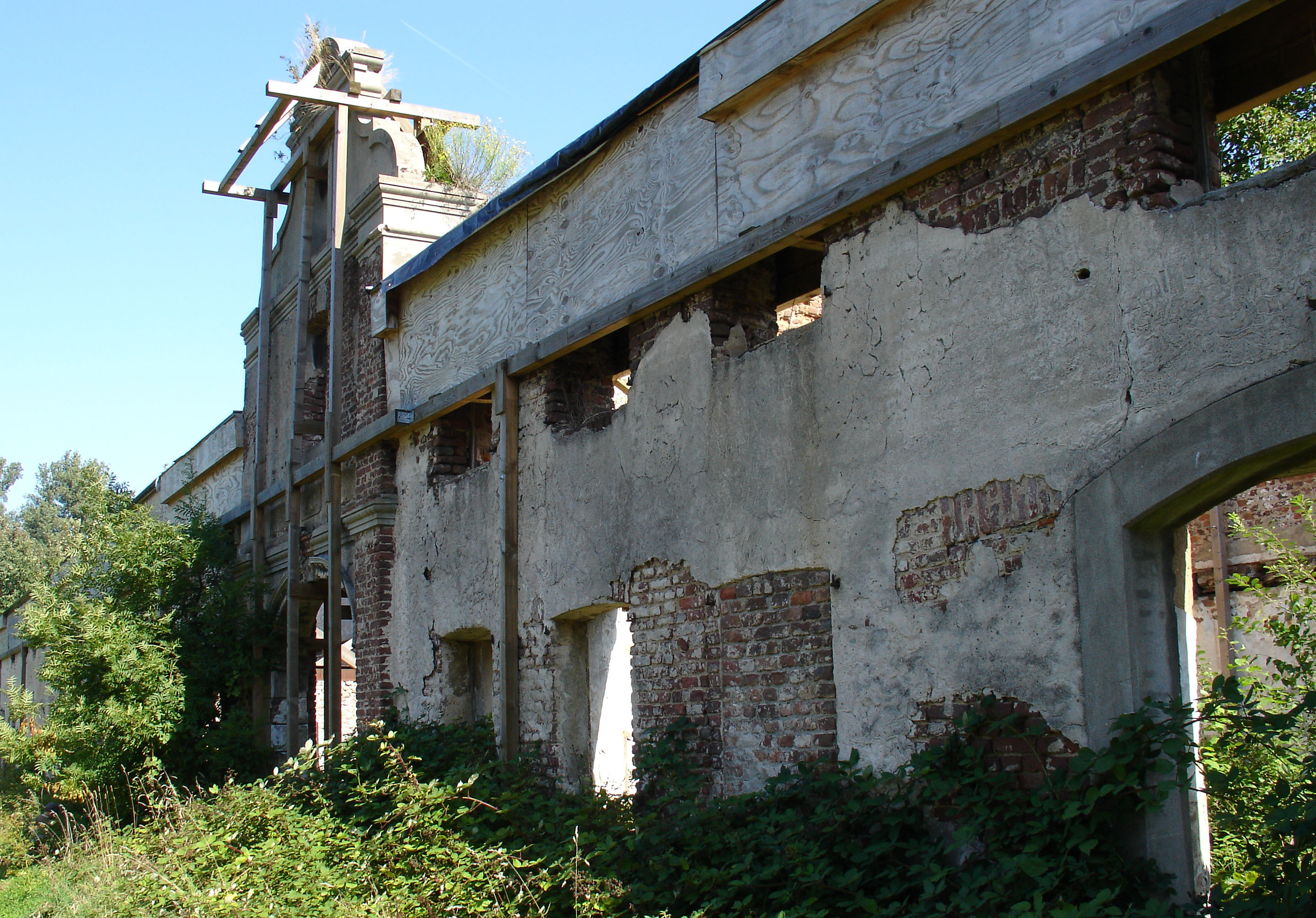 ehemalige Remise, Haus Meer in Büderich